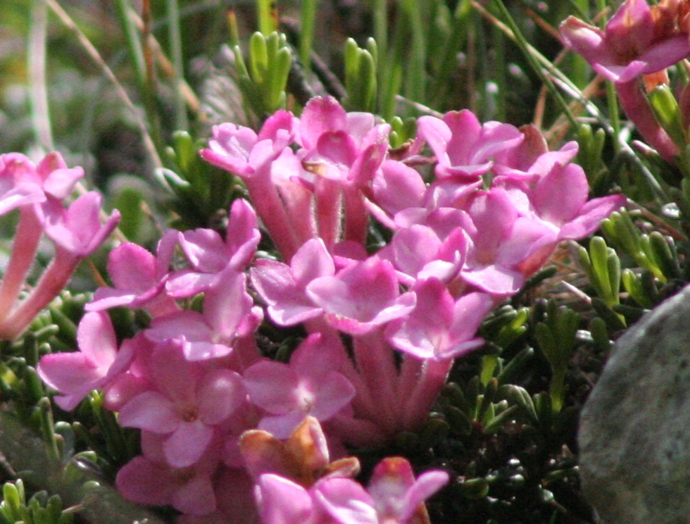 Daphne_petraea (Dafne minore) Località : "Giardino Botanico delle Alpi Orientali", Monte Faverghera (BL), 1500 m s.l.m.